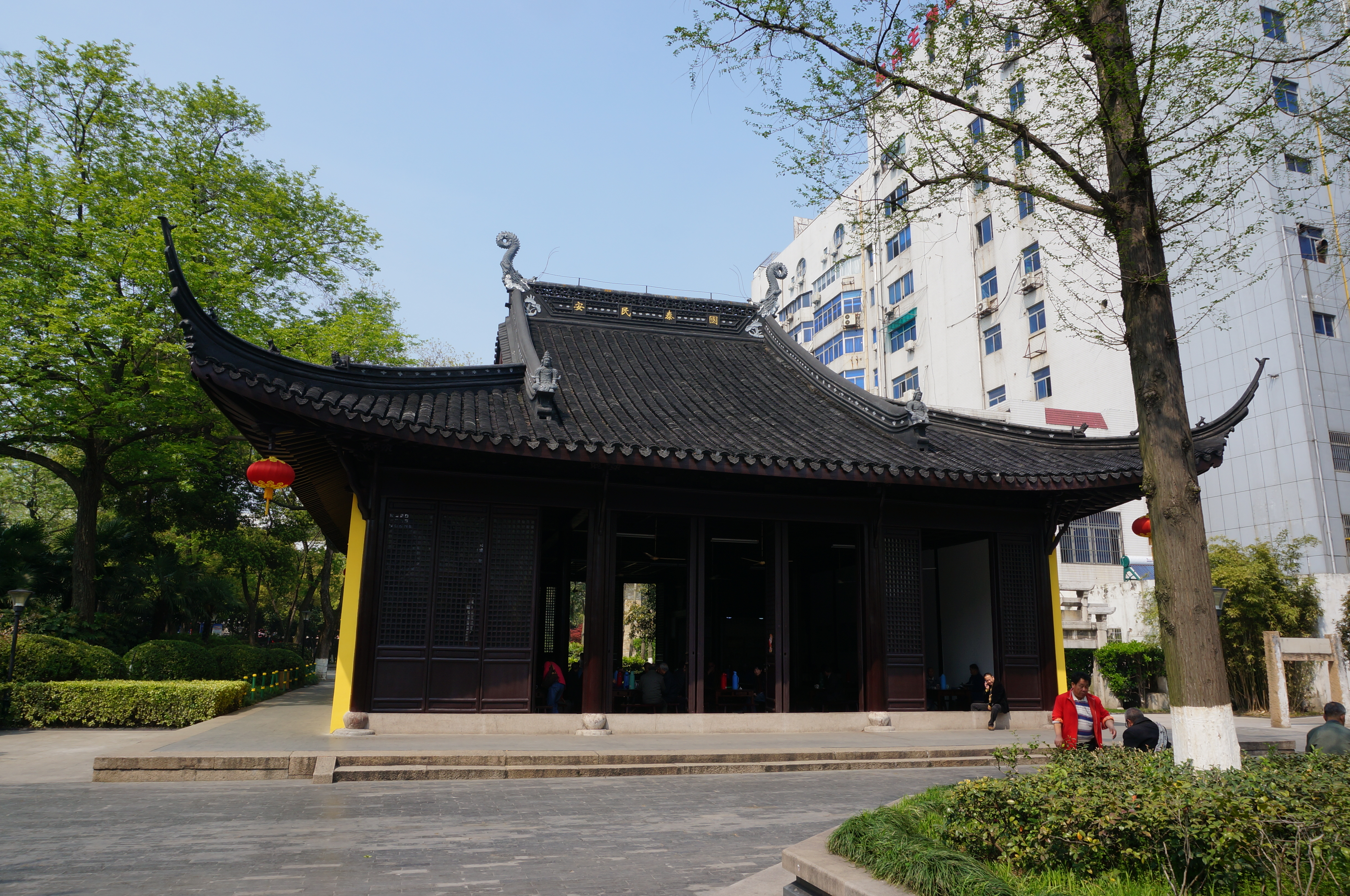 常州崇法寺，大殿。